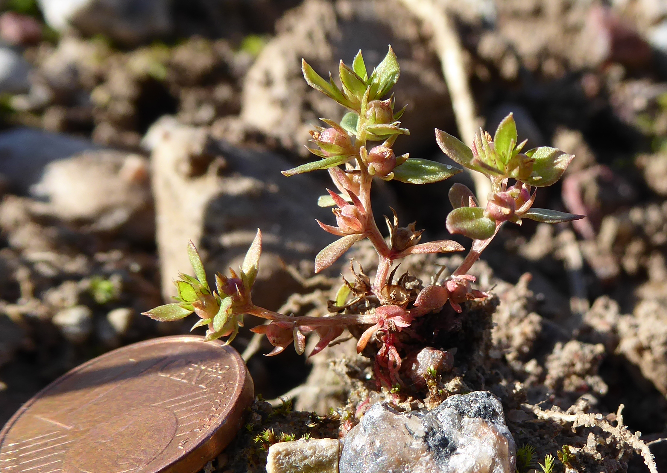 Põldpisikas (Centunculus minimus) Hiiumaal Tilgal 13. september 2017